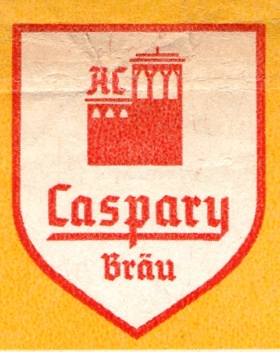 Logo der Caspary-Brauerei in Trier etwa 1960